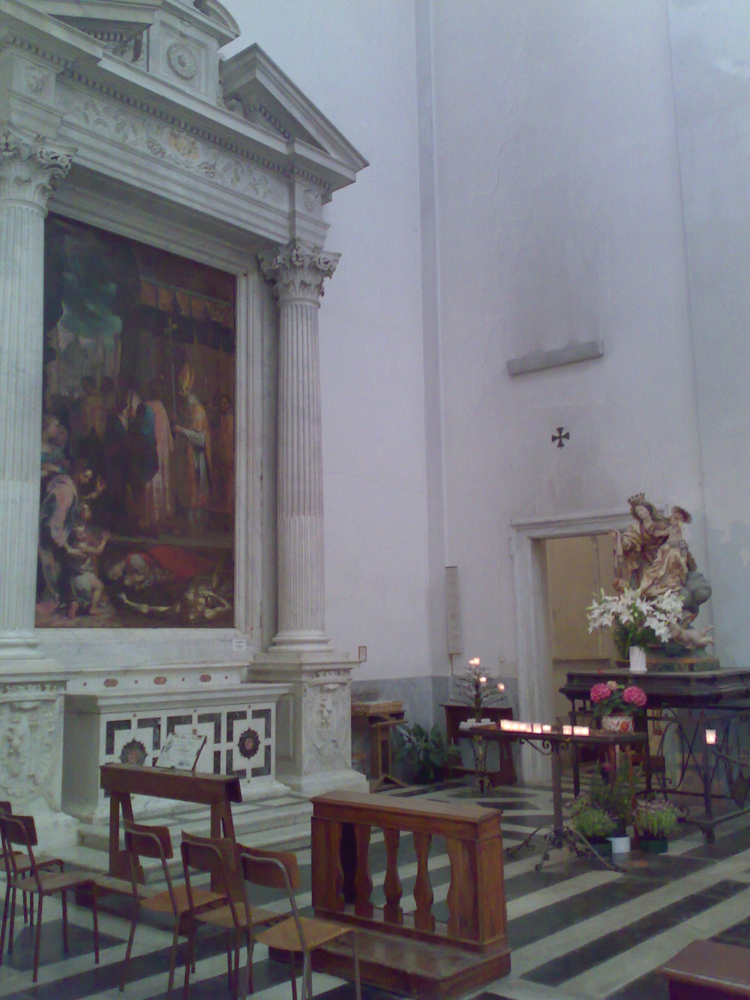 Tranestto ovest della chiesa del Convento di Monte Carmelo in Loano (Italy)